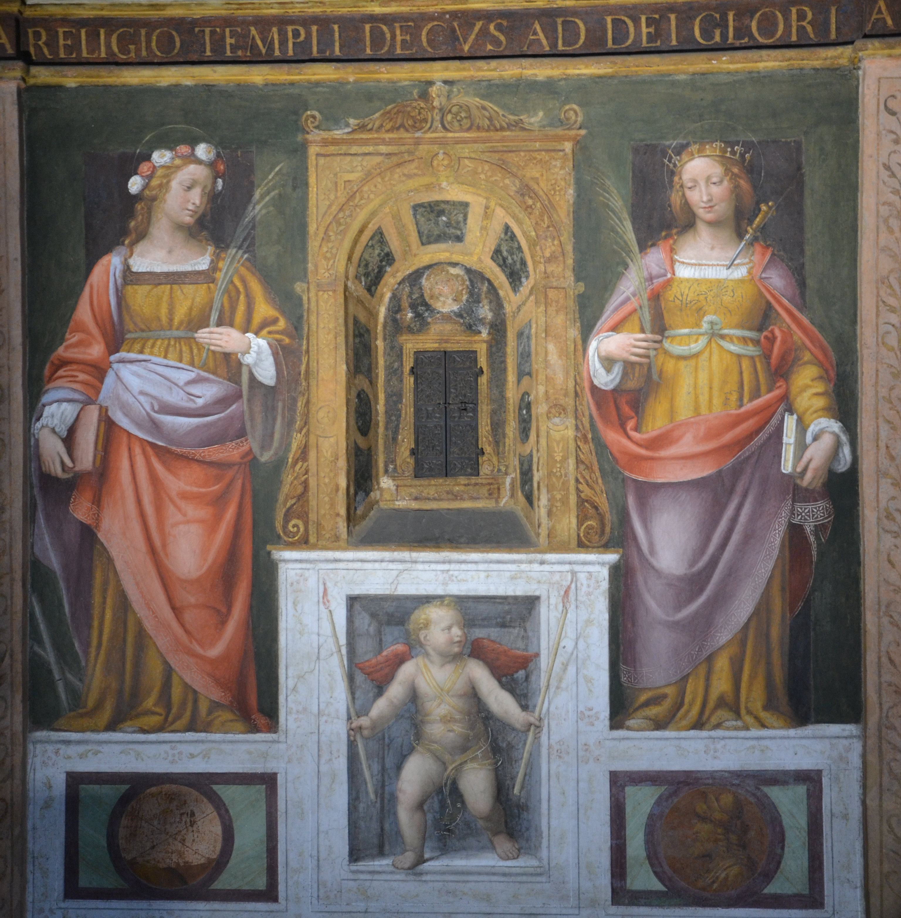 Milano - San Maurizio al monastero maggiore, aula dei fedeli, Affreschi di Bernardino Luini, del XVI secolo, Santa Cecilia e sant'Orsola